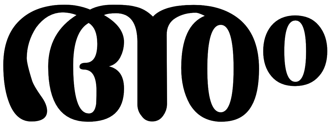 അന് മലയാളം അക്ഷരം